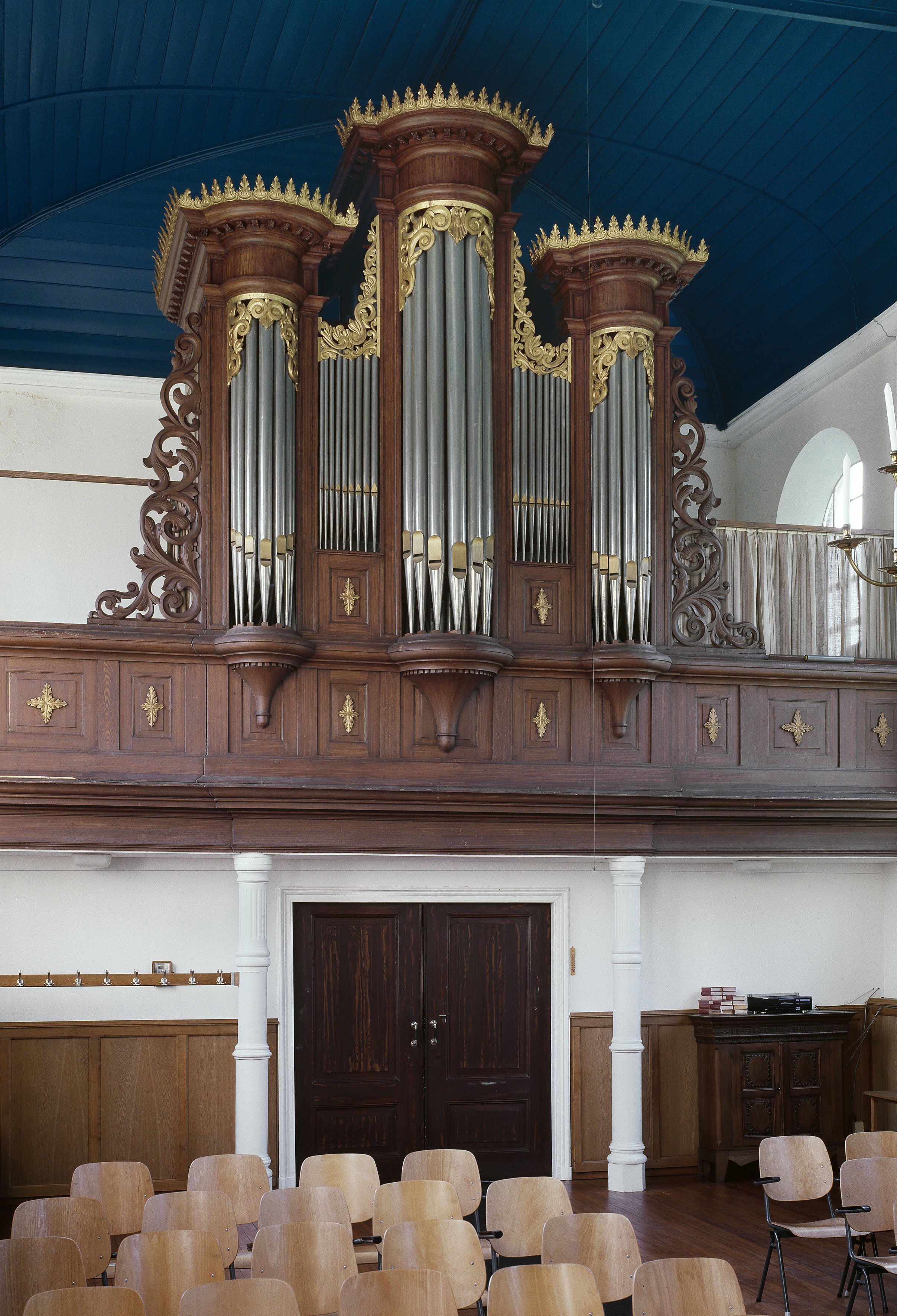 Nederlands Hervormde Kerk: Interieur, aanzicht orgel, orgelnummer 798 (opmerking: Gefotografeerd voor Het Historische Orgel in Nederland 1878-1886, Bladzijde 306)